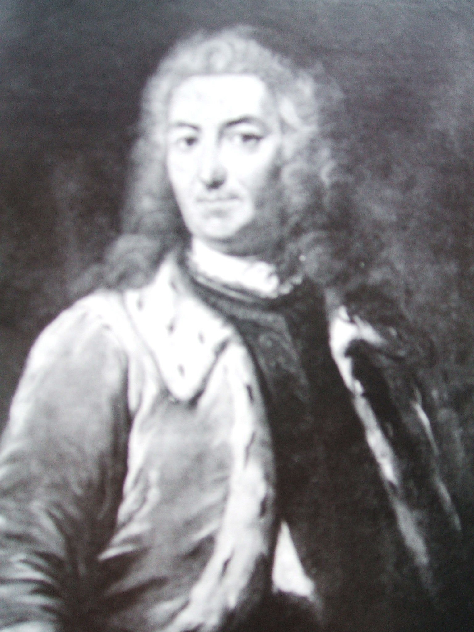 Das Foto zeigt Axel Graf von Löwen. Es handelt sich hier um ein Foto eines Ölgemäldes aus dem Geschäftszimmer der Königlichen Fortifikation Stockholm von Almberg und Preinitz.